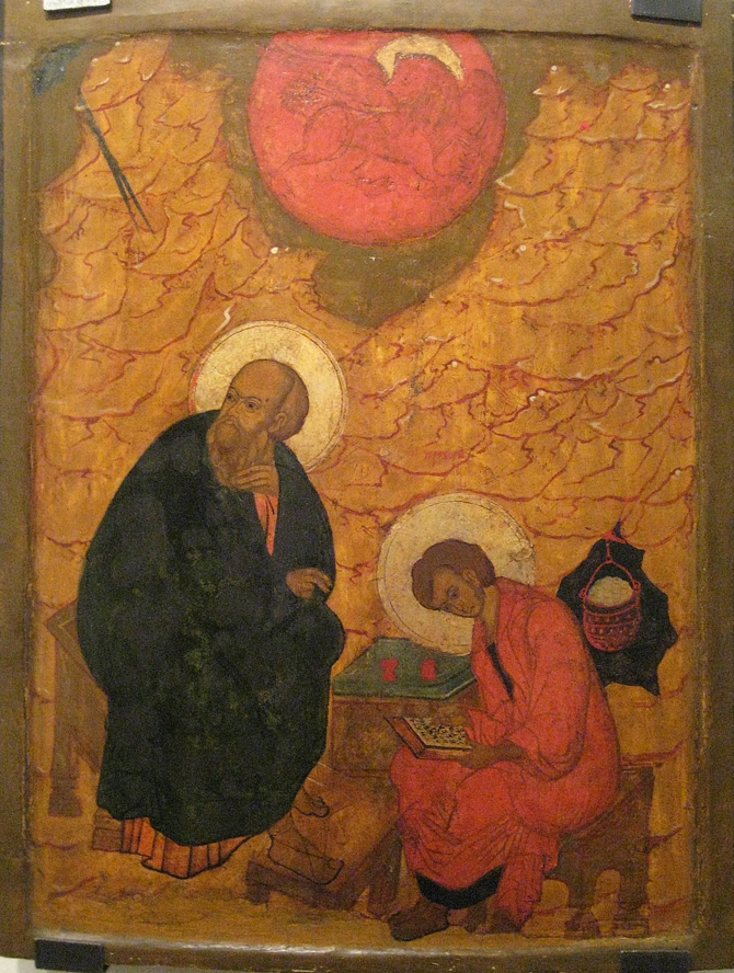 Иоанн Евангелист на Патмосе./Нижегородский государственный художественный музей/ John at Patmos/ The Nizhny Novgorod Art Museum